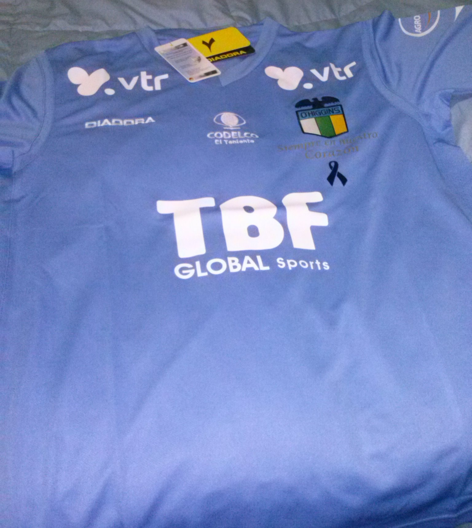 Camiseta O'Higgins Campeón